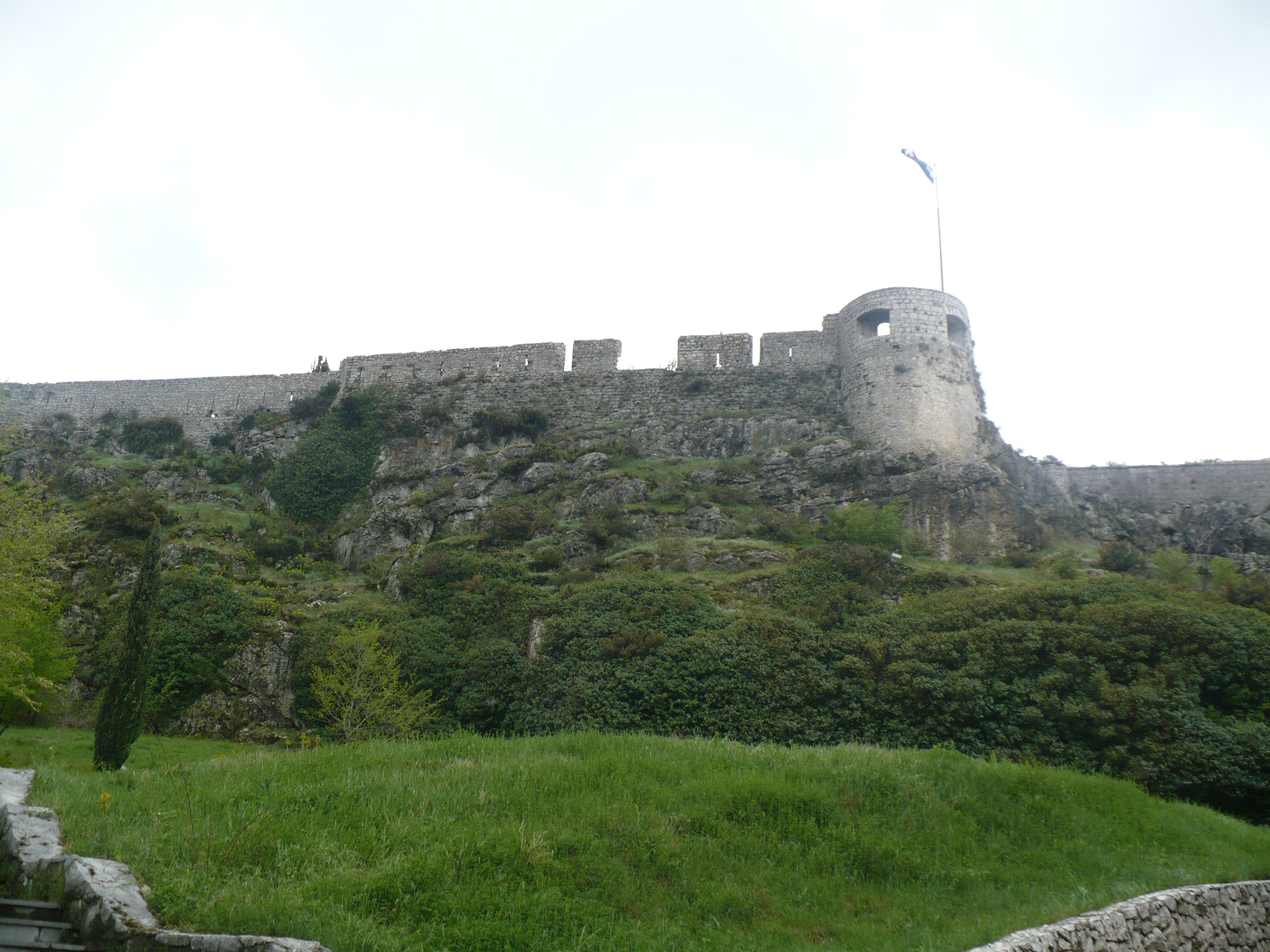 Klis Kalesi